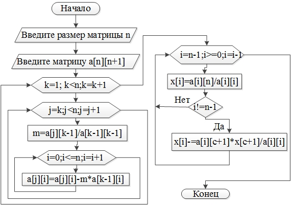 Алгоритм Гаусса для решения САУ